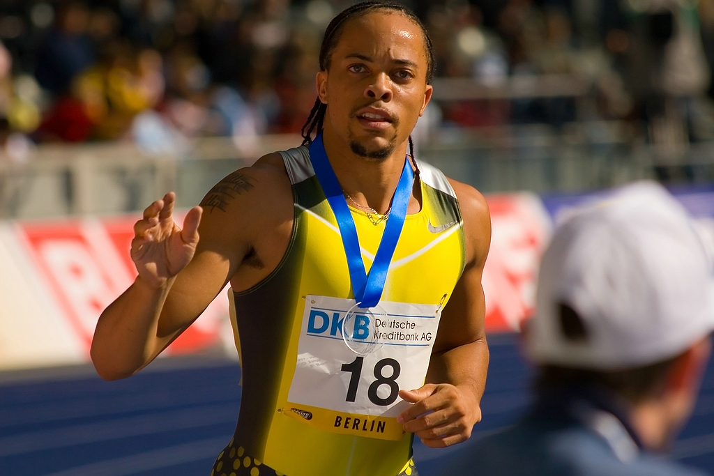 Spearmon Sieger 200m